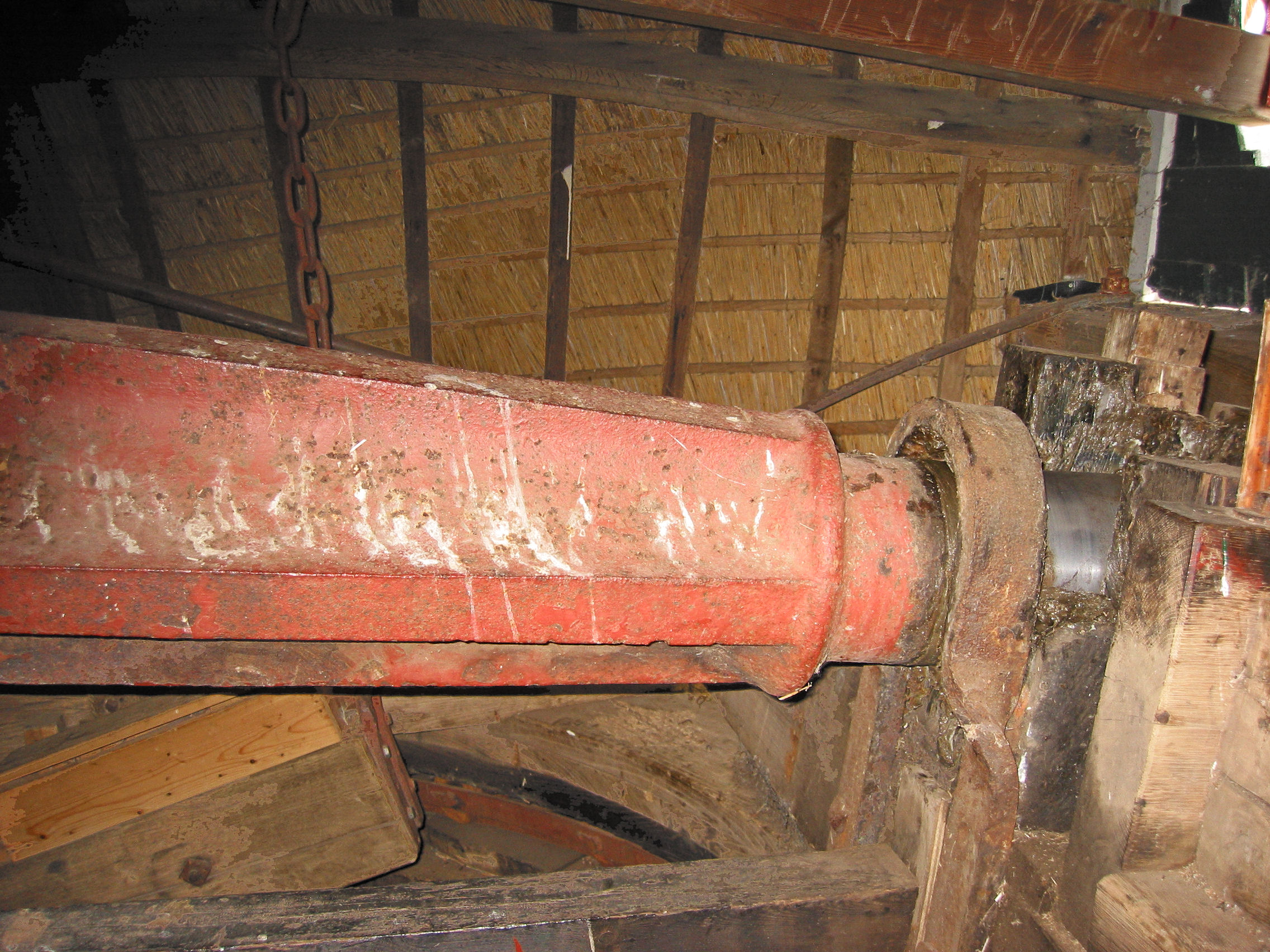 (nl: penlager van gietijzeren bovenas van Walderveensemolen in Walderveen, Gelderland, the Netherlands